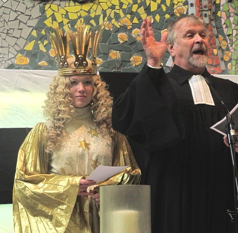 Weihnachtsgottesdienst im Nürnberger Hauptbahnhof mit dem Nürnberger Christkind